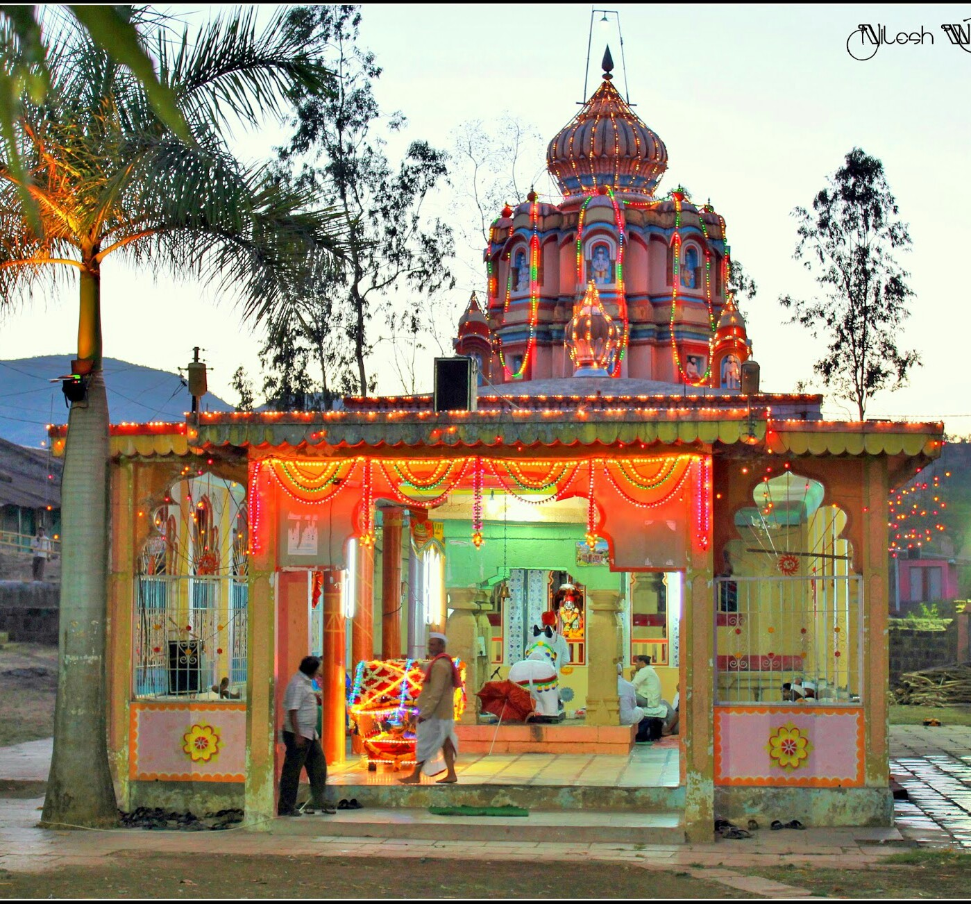 अमृतेश्वर मंदिर